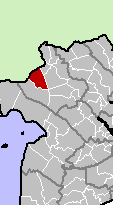 Tinh Bien District, An Giang Province, Vietnam.